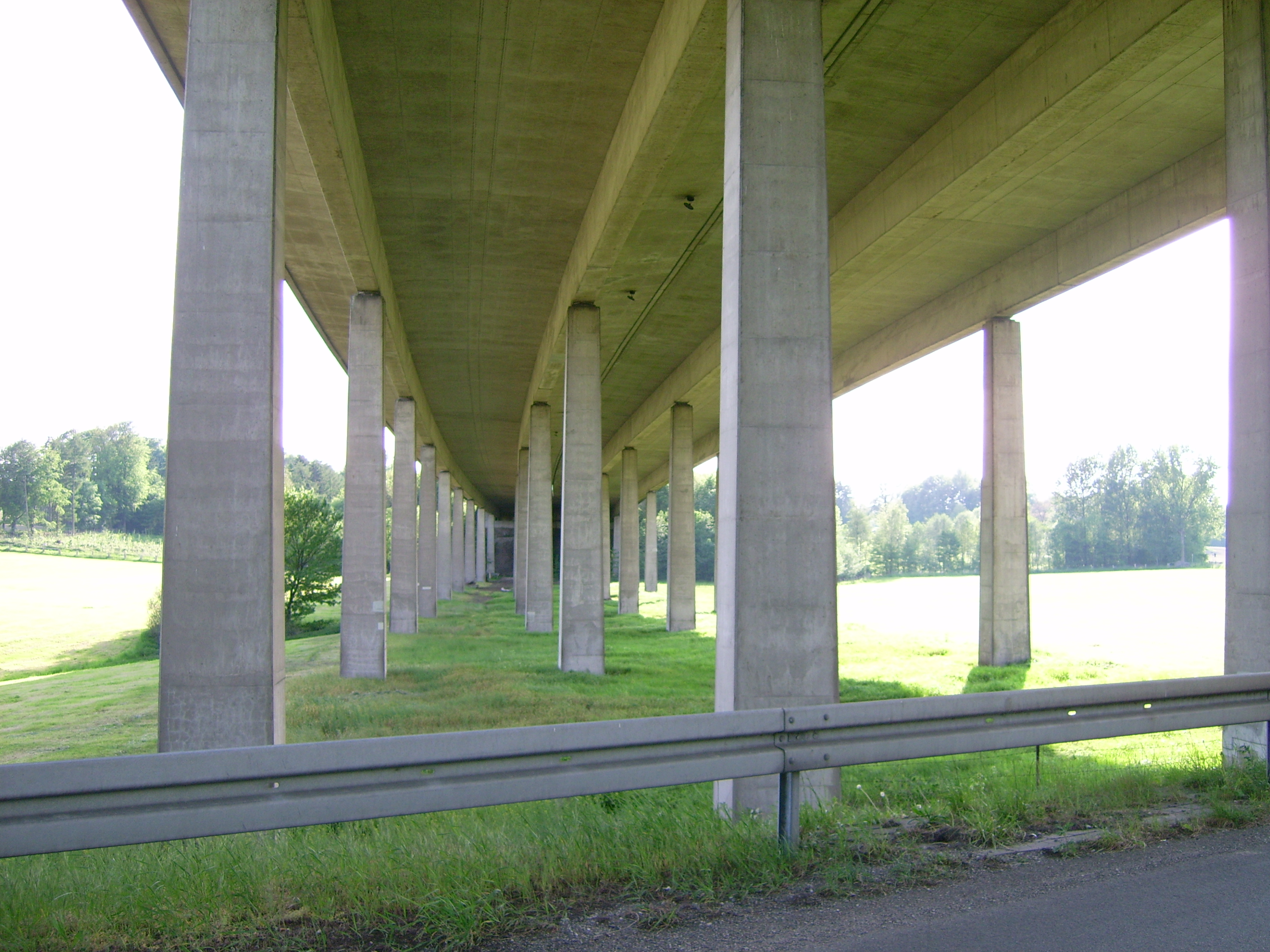 Talbrücke Exterheide, Blick in Richtung Münster